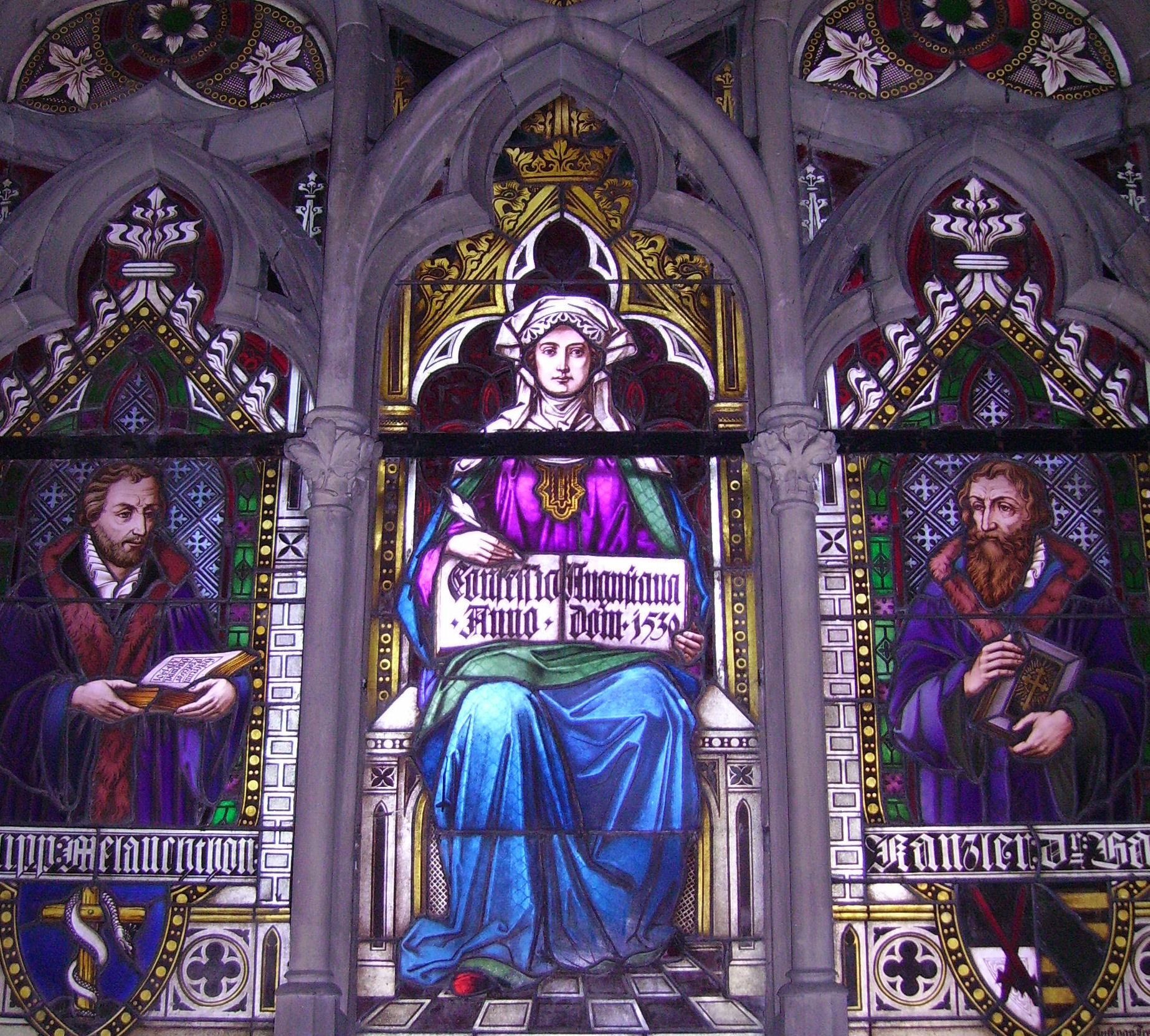 Gedächtniskirche (Memorial Church) in Speyer, Germany